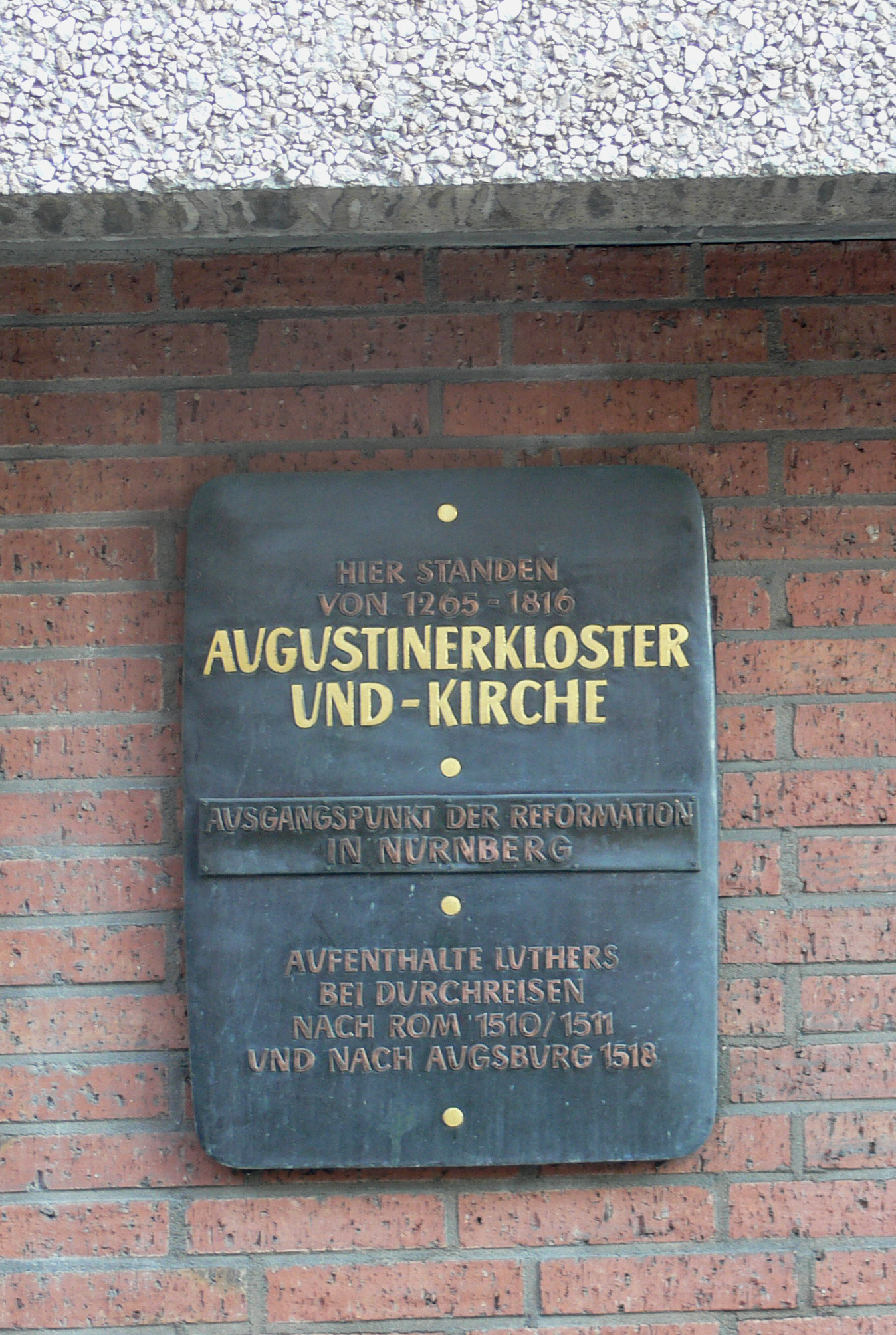 Nürnberg, Parkhaus "Hauptmarkt", Augustinerstraße, Gedenktafel an das abgebrochene Augustinerkloster